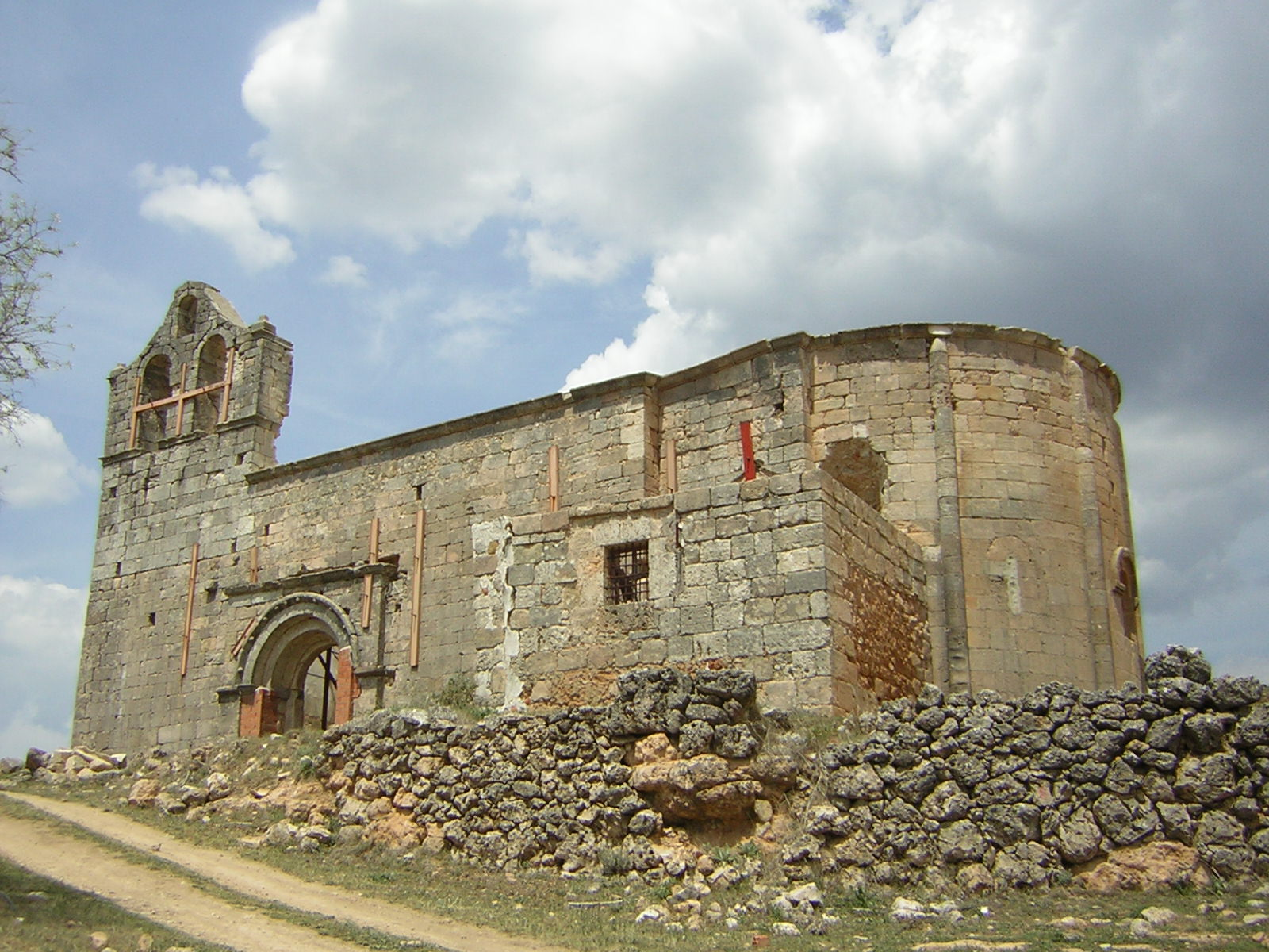 Iglesia románica de Villaescusa de Palositos (Guadalajara-España). Declarada Bien de Interés Cultural en junio de 2012 por la Junta de Castilla-La Mancha, con la categoría de Monumento. Su estado de deterioro y abandono hace presagiar que no tardará en desplomarse. En un sillar está grabado el nombre de su autor “Gilem”. El resto de sillares está destinado a grabar el nombre de los que, con su falta de apoyo real al Patrimonio Histórico, están provocando su desaparición para generaciones futuras.